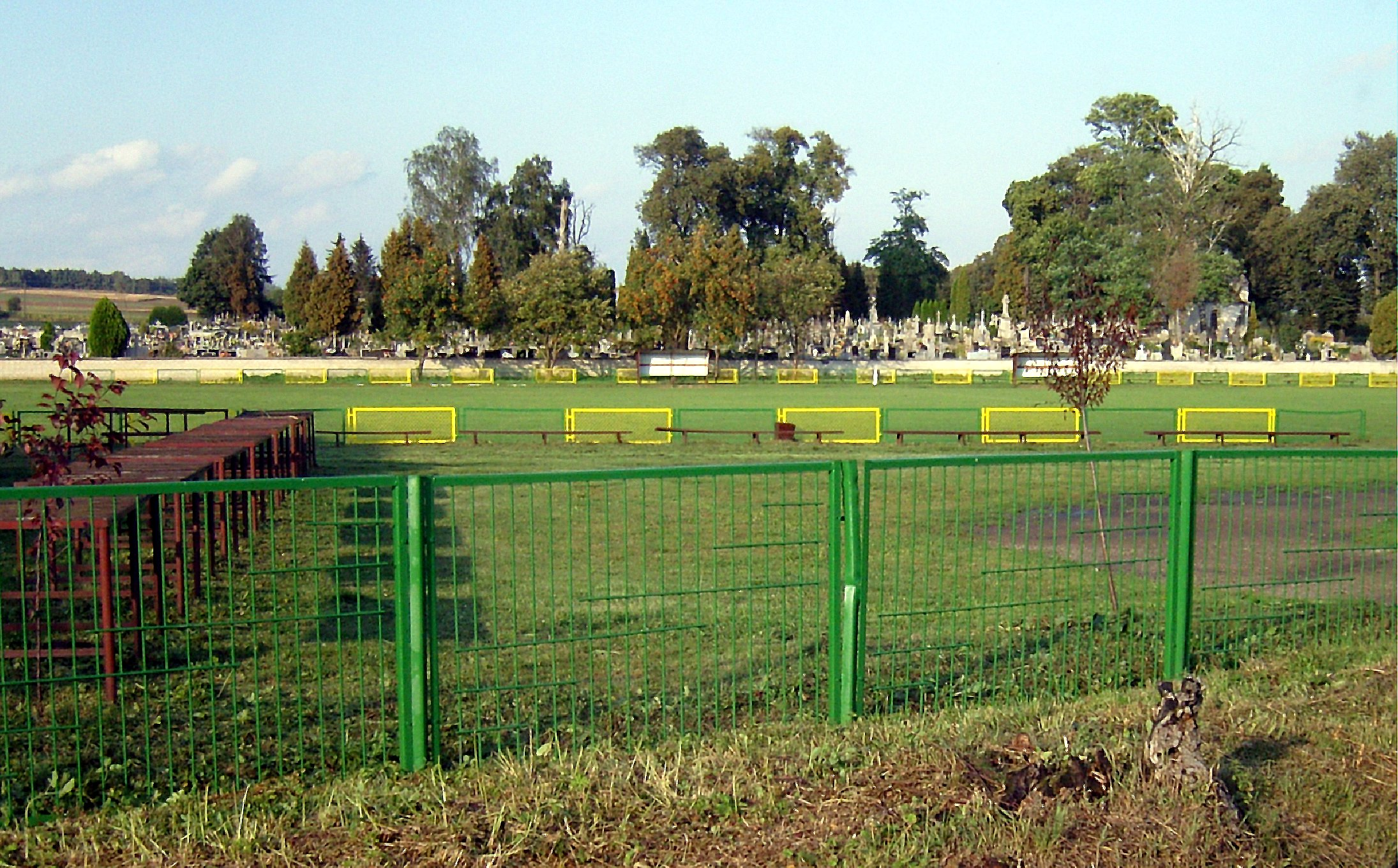 Gorzków Cemetery